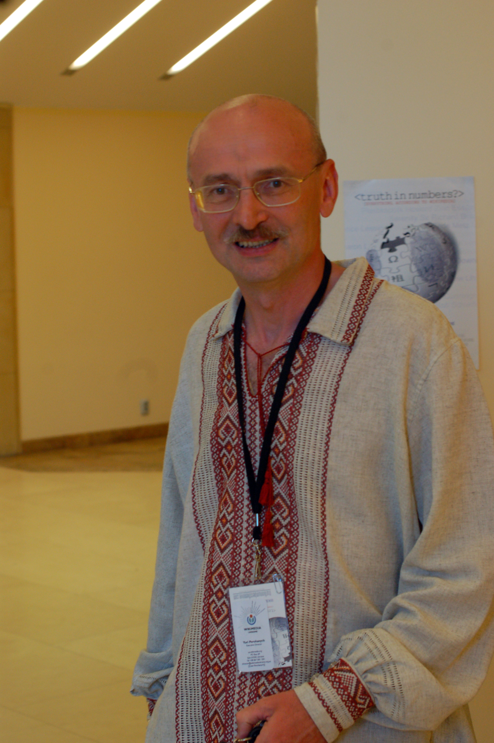 Wikimania Gdansk 2010